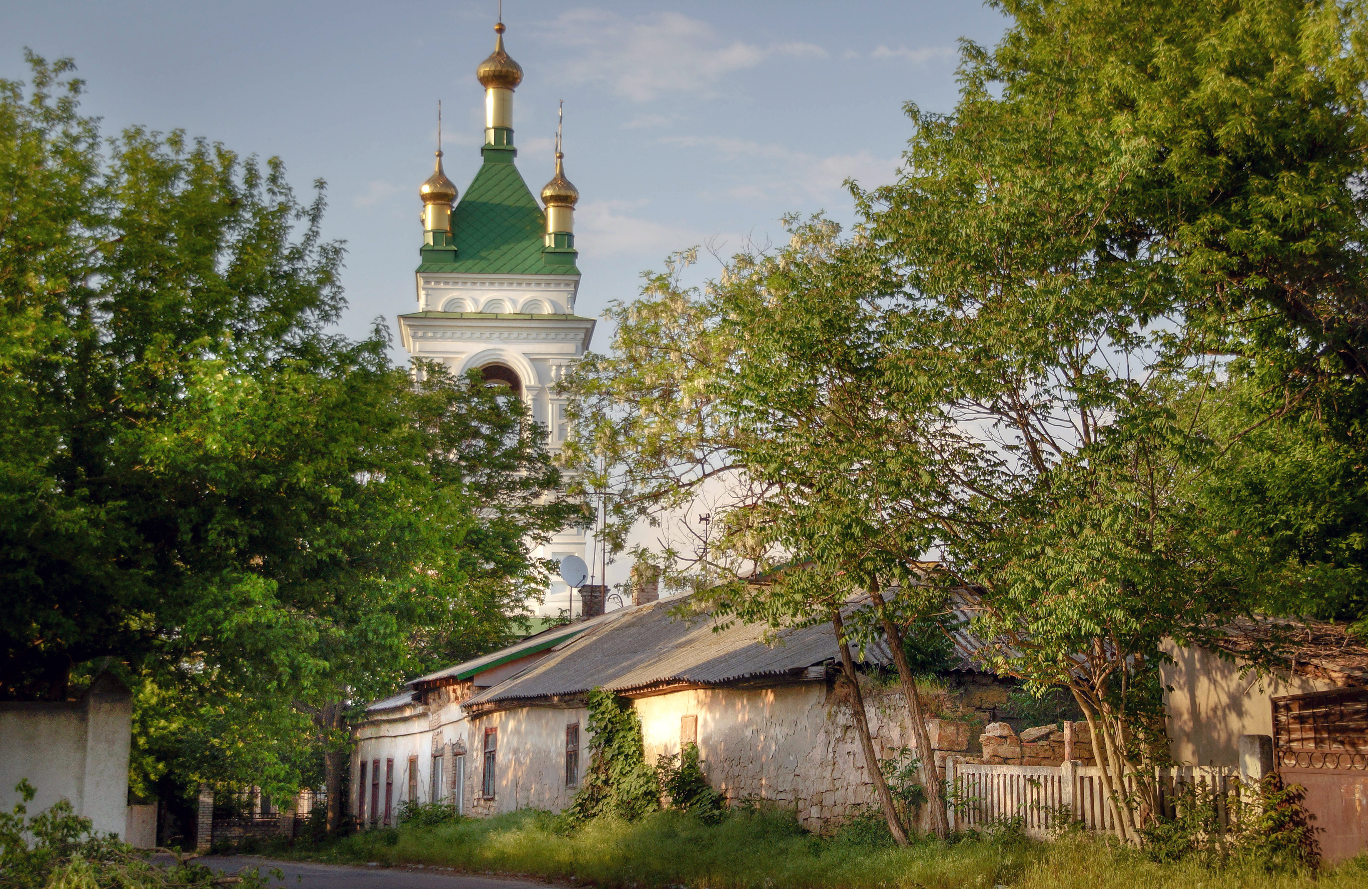 Миколаївська церква та дзвіниця, Кілія, вул. Дунайська, 4